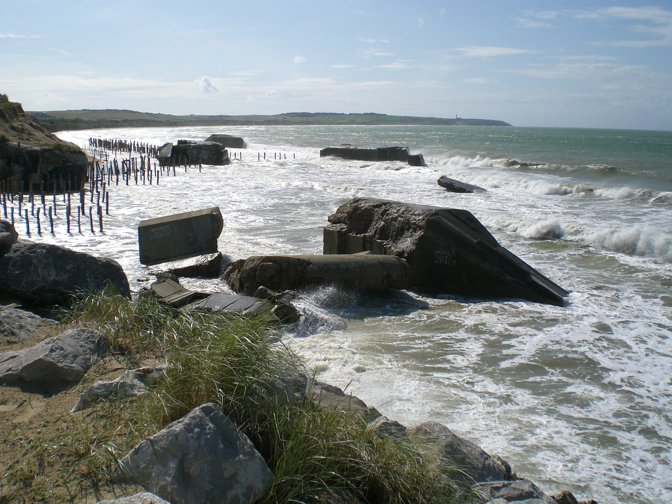 Prise de vue réalisé sur le littoral de Wissant. On distingue les bunkers de la seconde guerre mondiale rongés avec le temps et les attaques de la mer et au loin le Cap Gis-Nez.